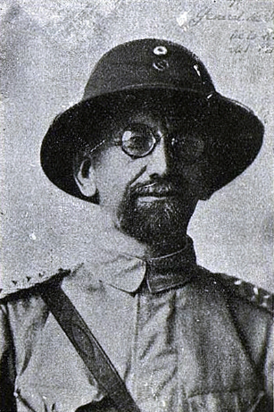 Беля́ев Ива́н Тимофе́евич (исп. Juan Belaieff; 19 апреля 1875, Санкт-Петербург — 19 января 1957, Асунсьон) — русский генерал-майор.